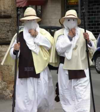 Pappamusci (Settimana santa di Francavilla Fontana)